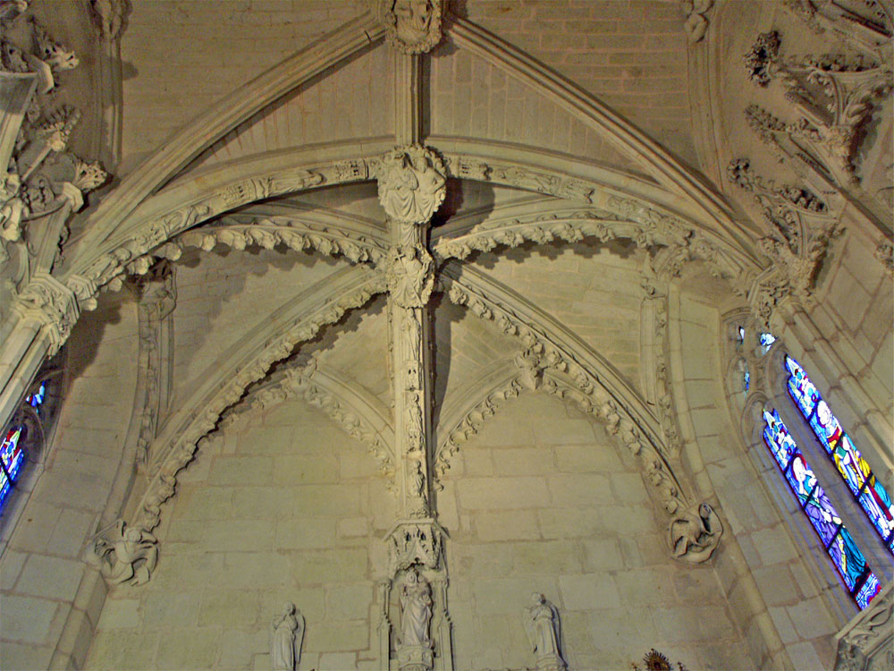 Voute de la chapelle du château de Ternay